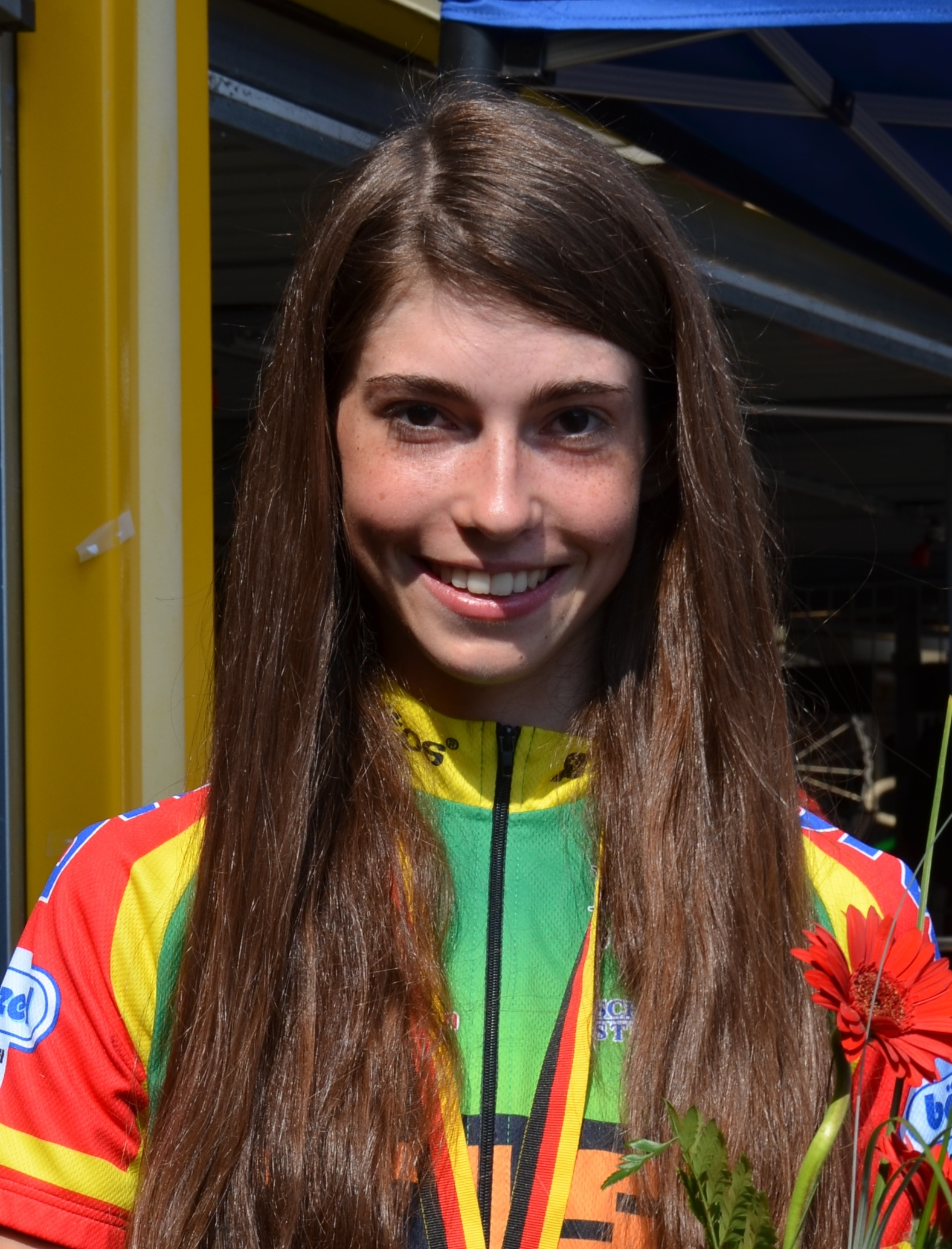 The making of this document was supported by the Community-Budget of Wikimedia Germany. Christa Riffel, deutsche Radsportlerin